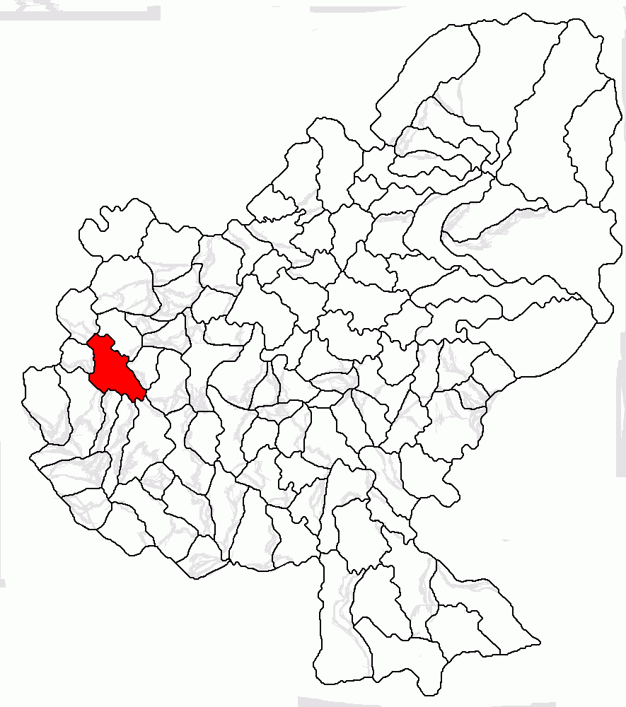 Categorie:Hărţi ale judeţului Mureş